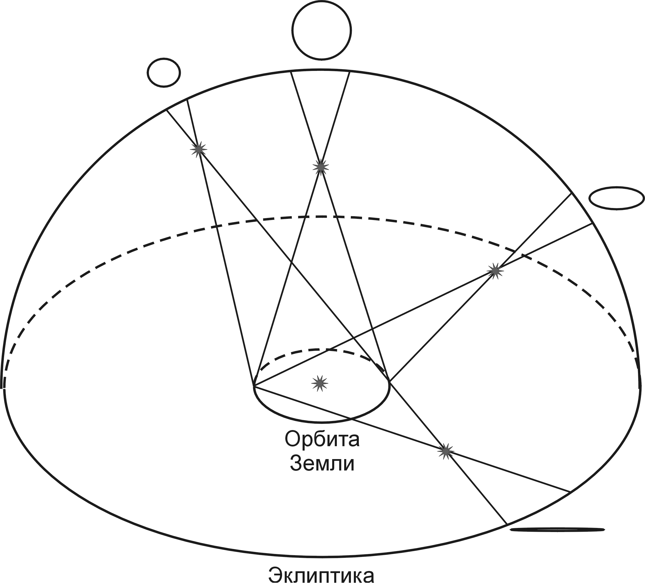 Параллактические эллипсы звёзд при различных расстояниях от плоскости эклиптики